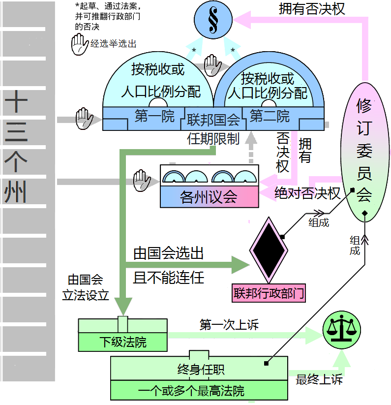 中文（中国大陆）: 弗吉尼亚方案介绍图简体中文版，汉化并重制